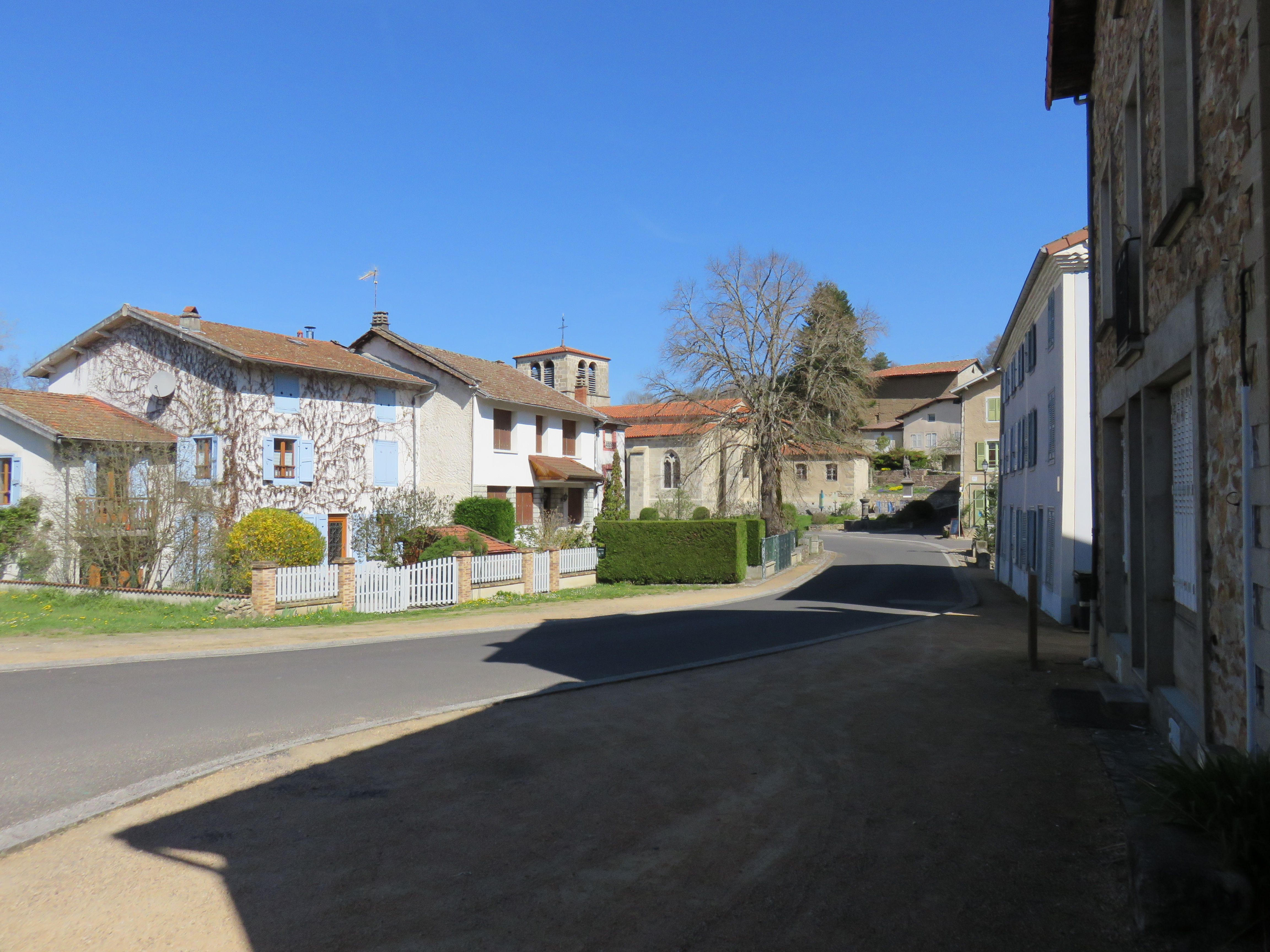 Rue du village de Beurières (Puy-de-Dôme, France).